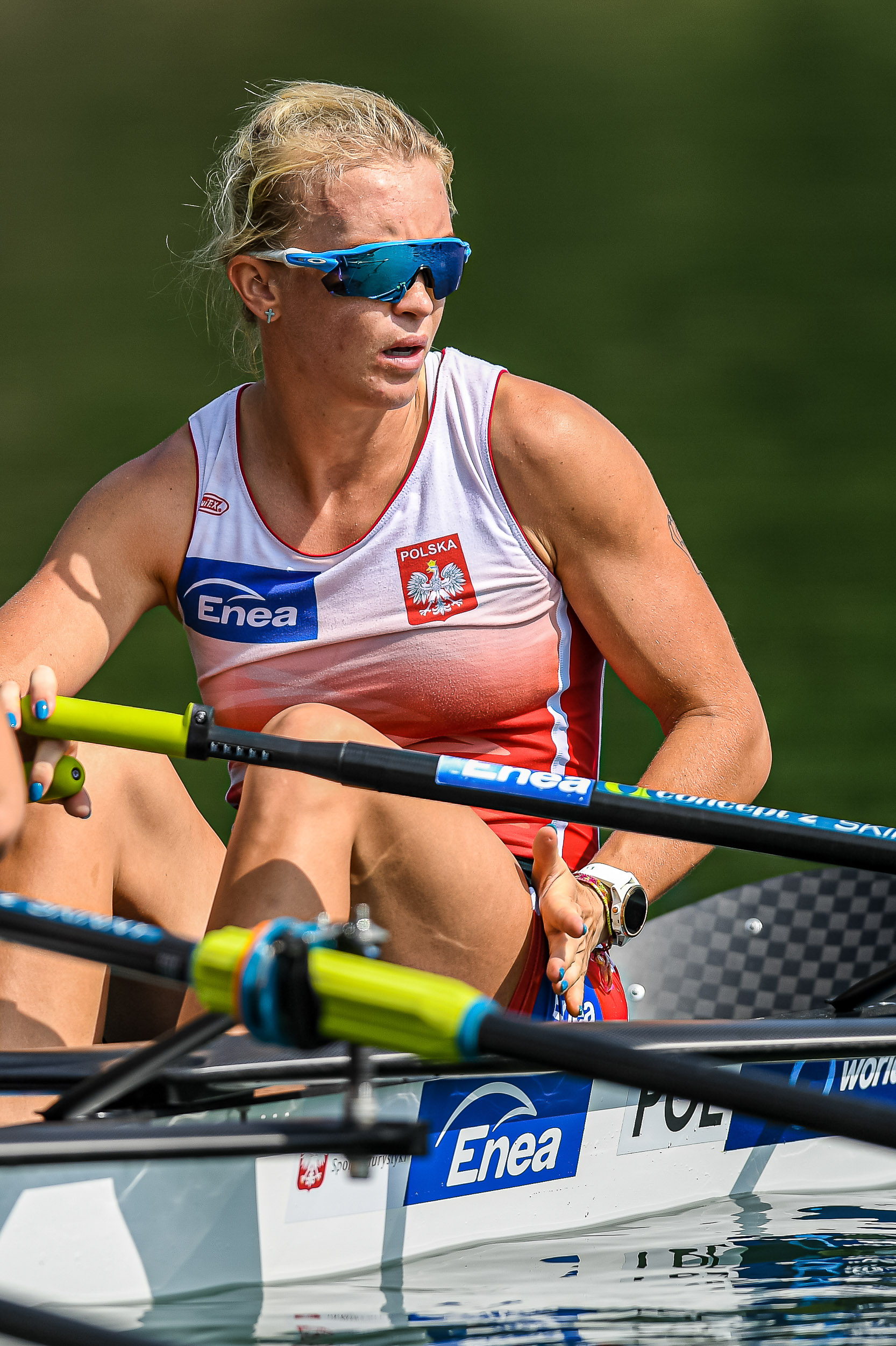 Polska wioślarka Agnieszka Kobus-Zawojska na czwórce podwójnej podczas zawodów w 2019 roku